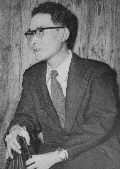 若月俊一